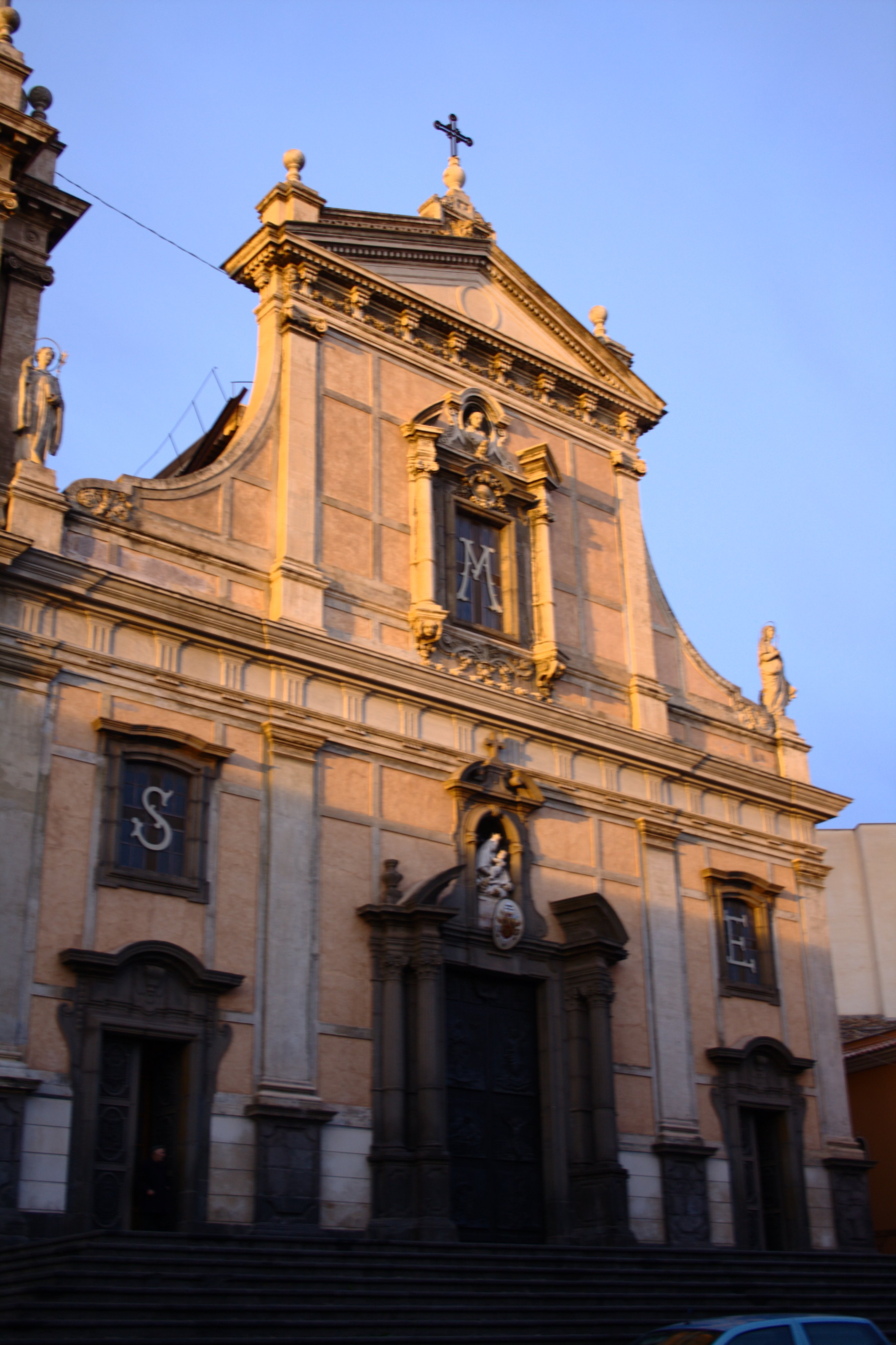 Biancavilla - Catania